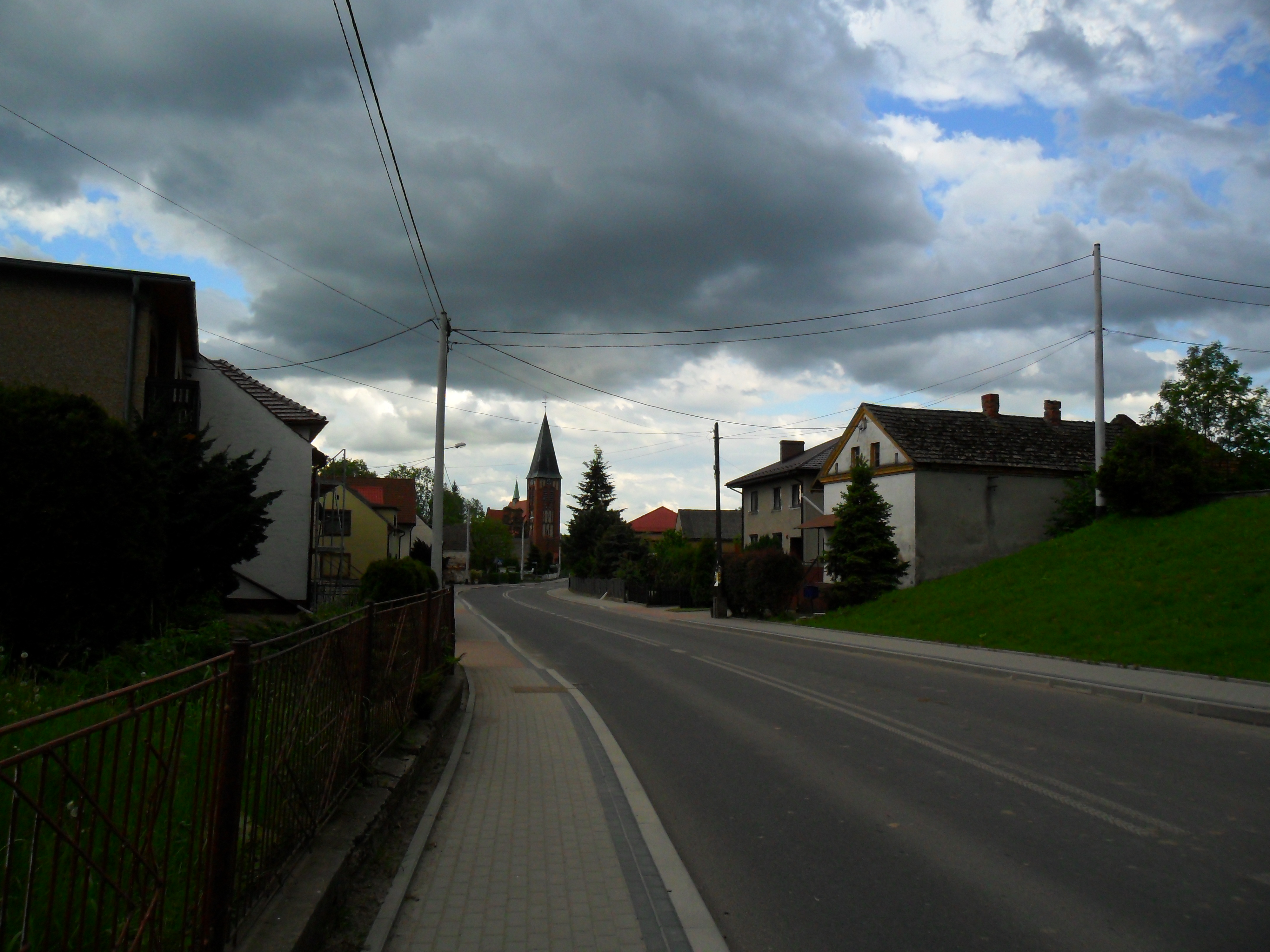 Pawłów, woj. śląskie, powiat raciborski